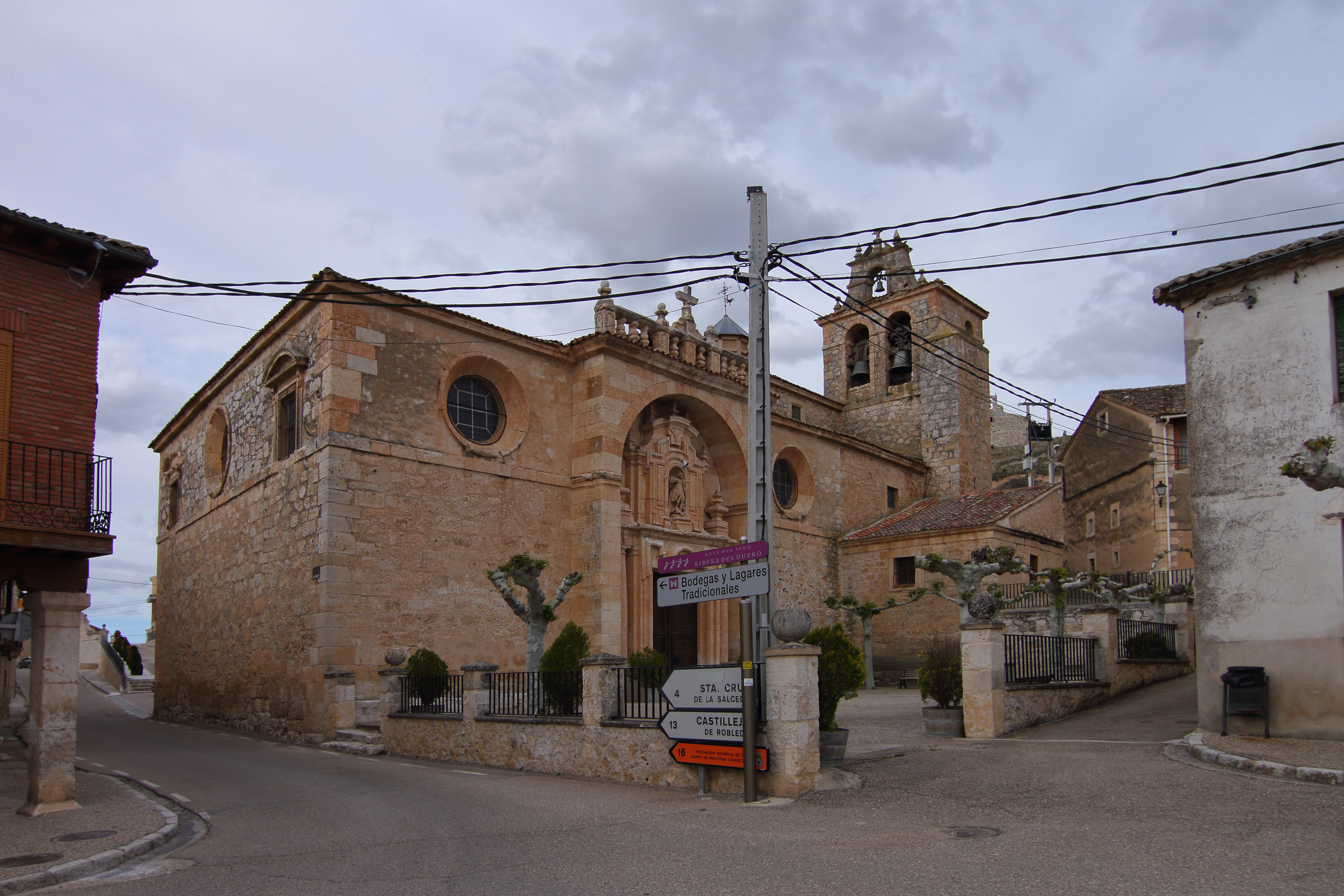 Fuentelcésped, Iglesia de San Miguel Árcangel, 01